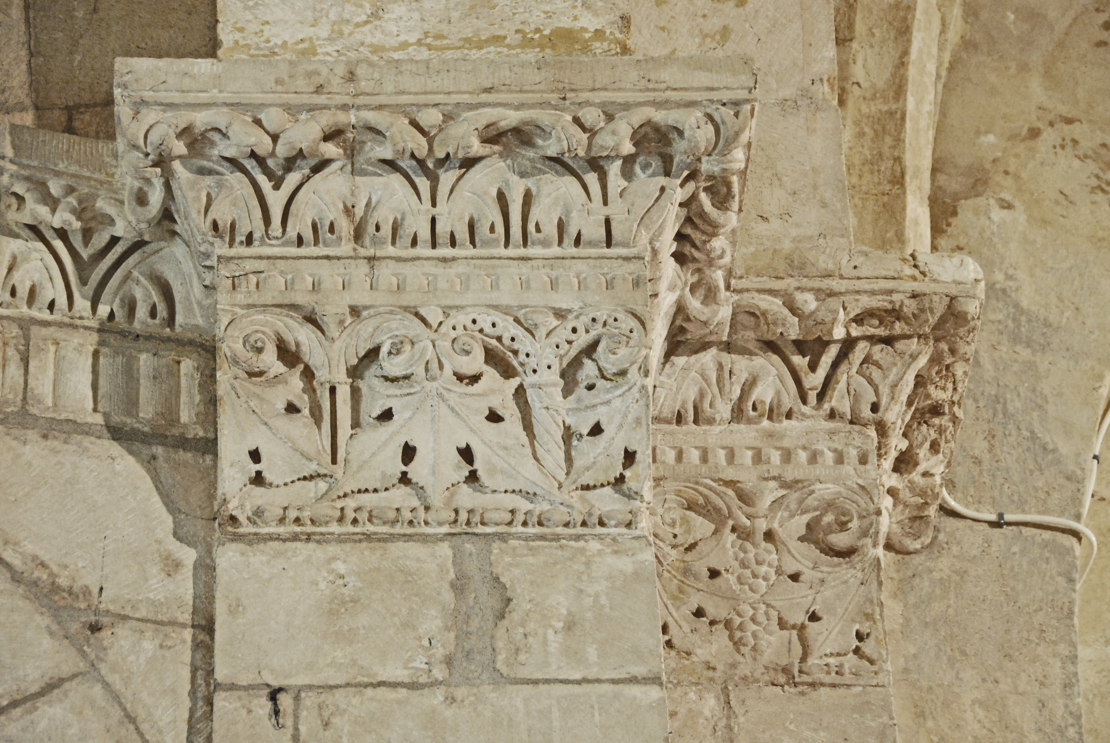 N-D et St-Christophe de St-Christol, Kapitellfries am Triumphbogen, Südseite